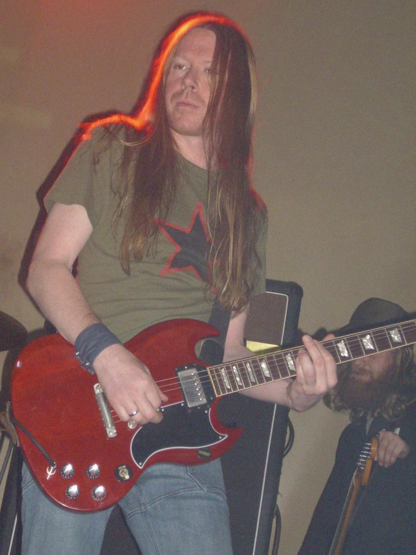 Sala Heineken Madrid , 28 Nov 2008